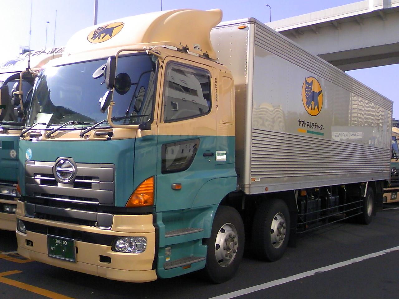 ヤマトマルチチャーター 大型フルキャブ。新社名ロゴ